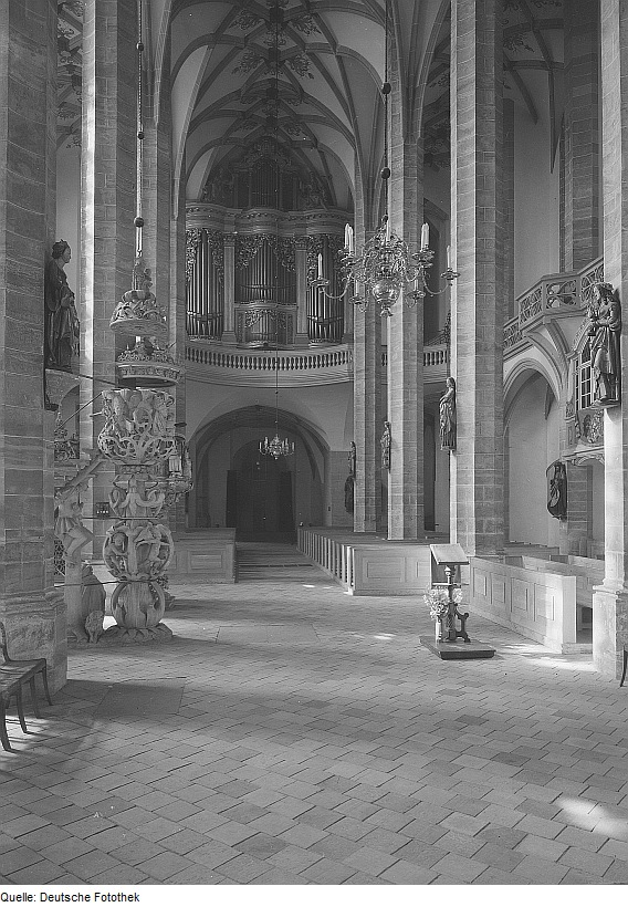 Original image description from the Deutsche Fotothek Freiberg. Dom, Inneres, Blick nach Westen zur Orgel